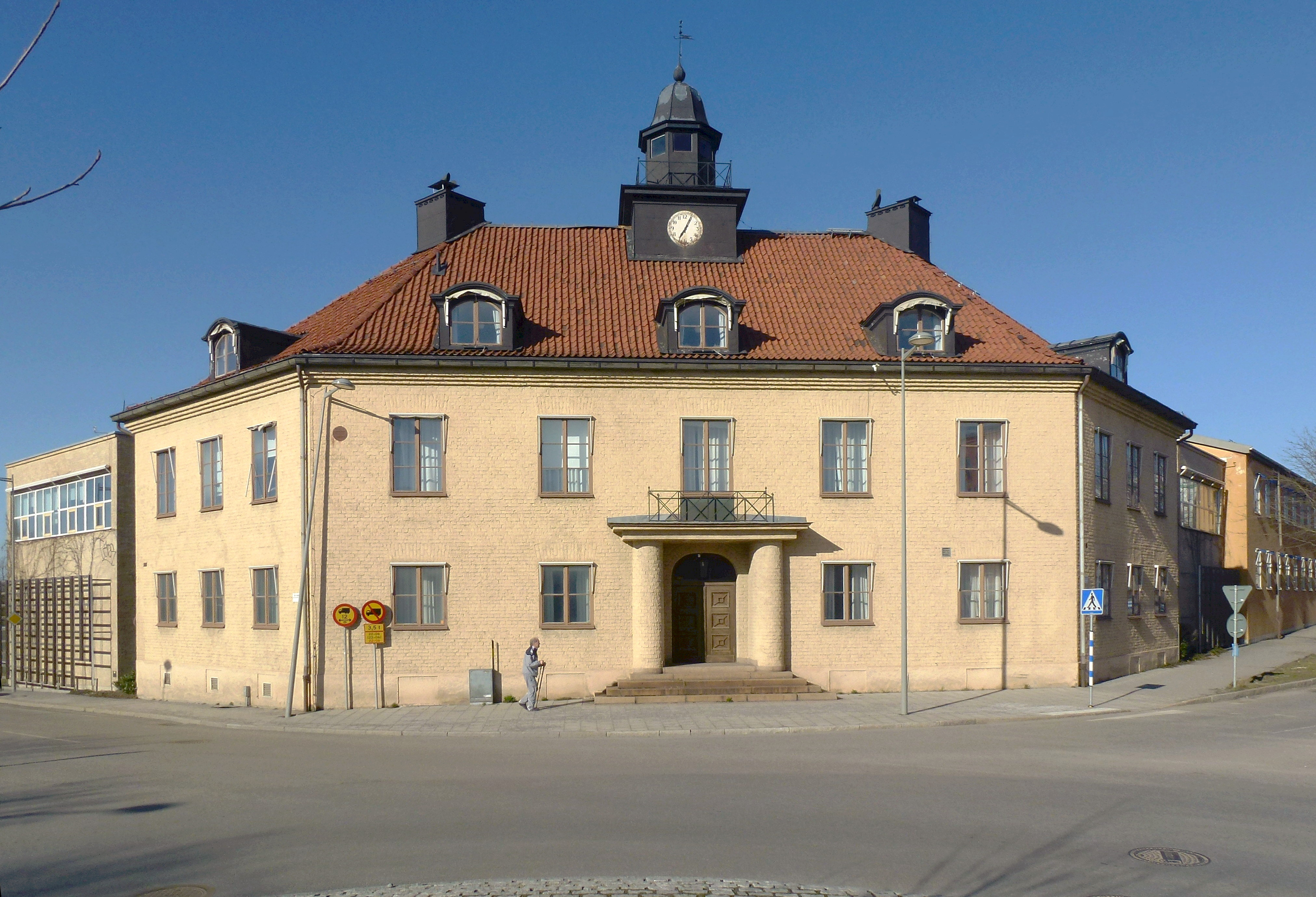 Klockhuset i Solberga. Kontorsbyggnad från 1918 som ursprungligen uppfördes som huvudbyggnad för AB Stockholmstelefons kabelfabrik. Idag ingår byggnaden i en konferensanläggning. Arkitekt Ivar Callmander